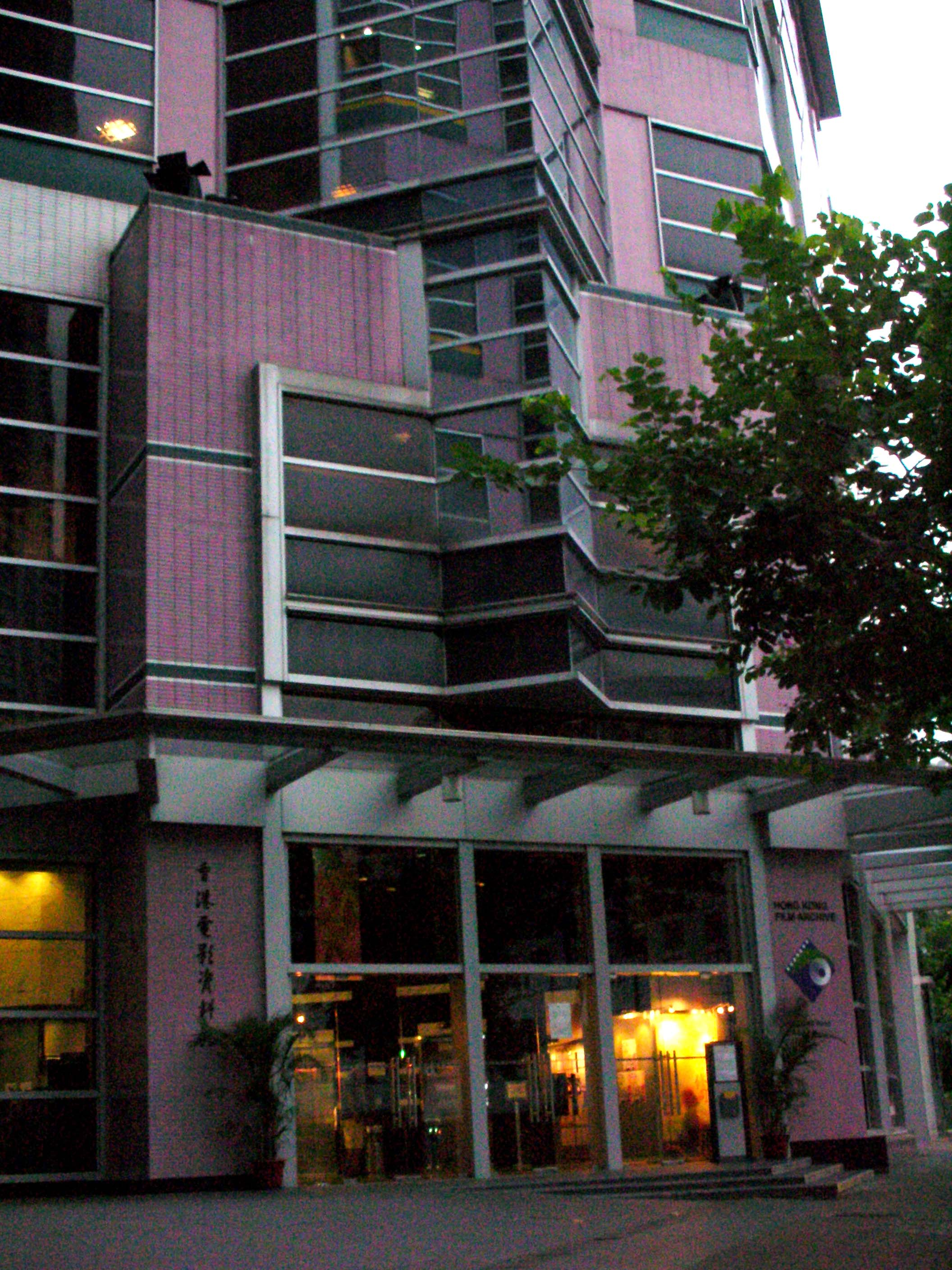 Hong Kong Film Archive, Sai Wan Ho, Hong Kong 香港電影資料館，位於香港西灣河。